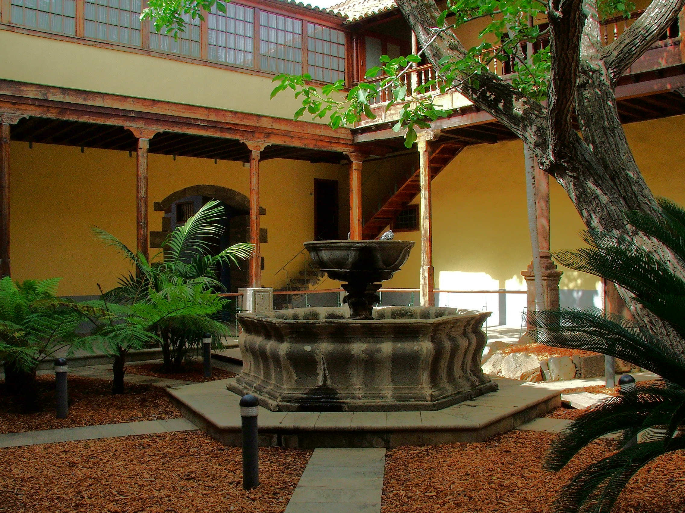 Casa de los Capitanes Generales Patio La Laguna